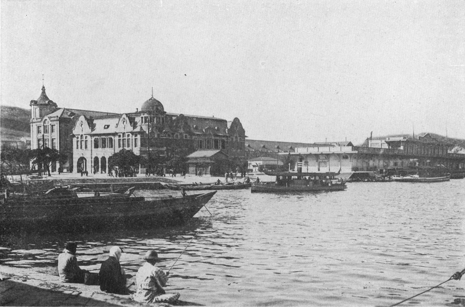 中文（台灣）: 作者：勝山吉作。基隆車站附近。典藏者：中央研究院數位物件典藏者：中央研究院數位文化中心。公眾領域標章（Public Domain Mark）。發佈於《開放博物館》 1930年代的基隆車站前，其中建築為大阪商船会社基隆支店與基隆港